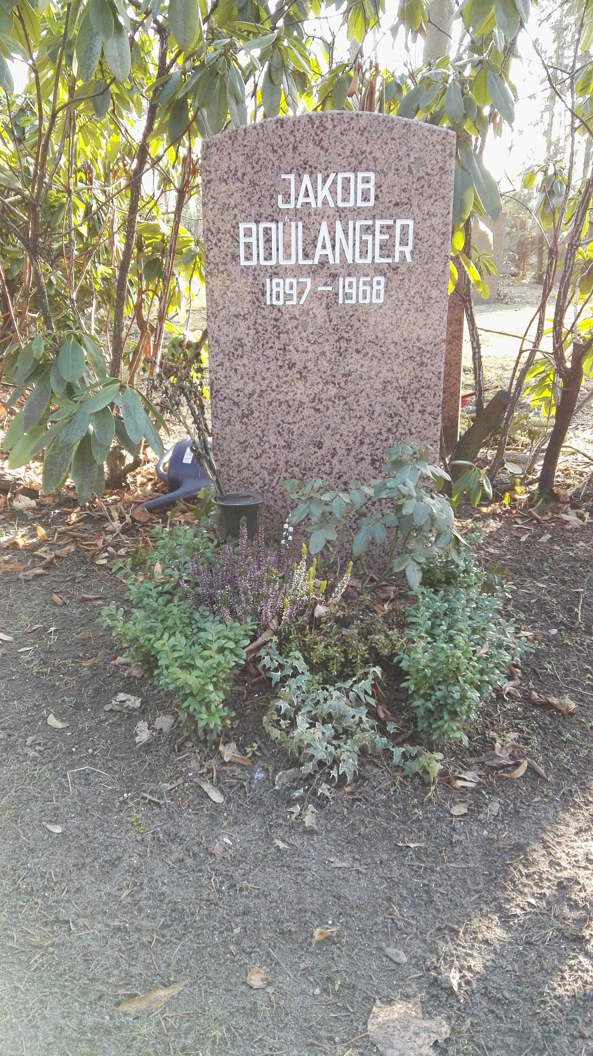 Grab von Jakob Boulanger in der Grabanlage Pergolenweg auf dem Sozialistenfriedhof des Zentralfriedhofs Friedrichsfelde